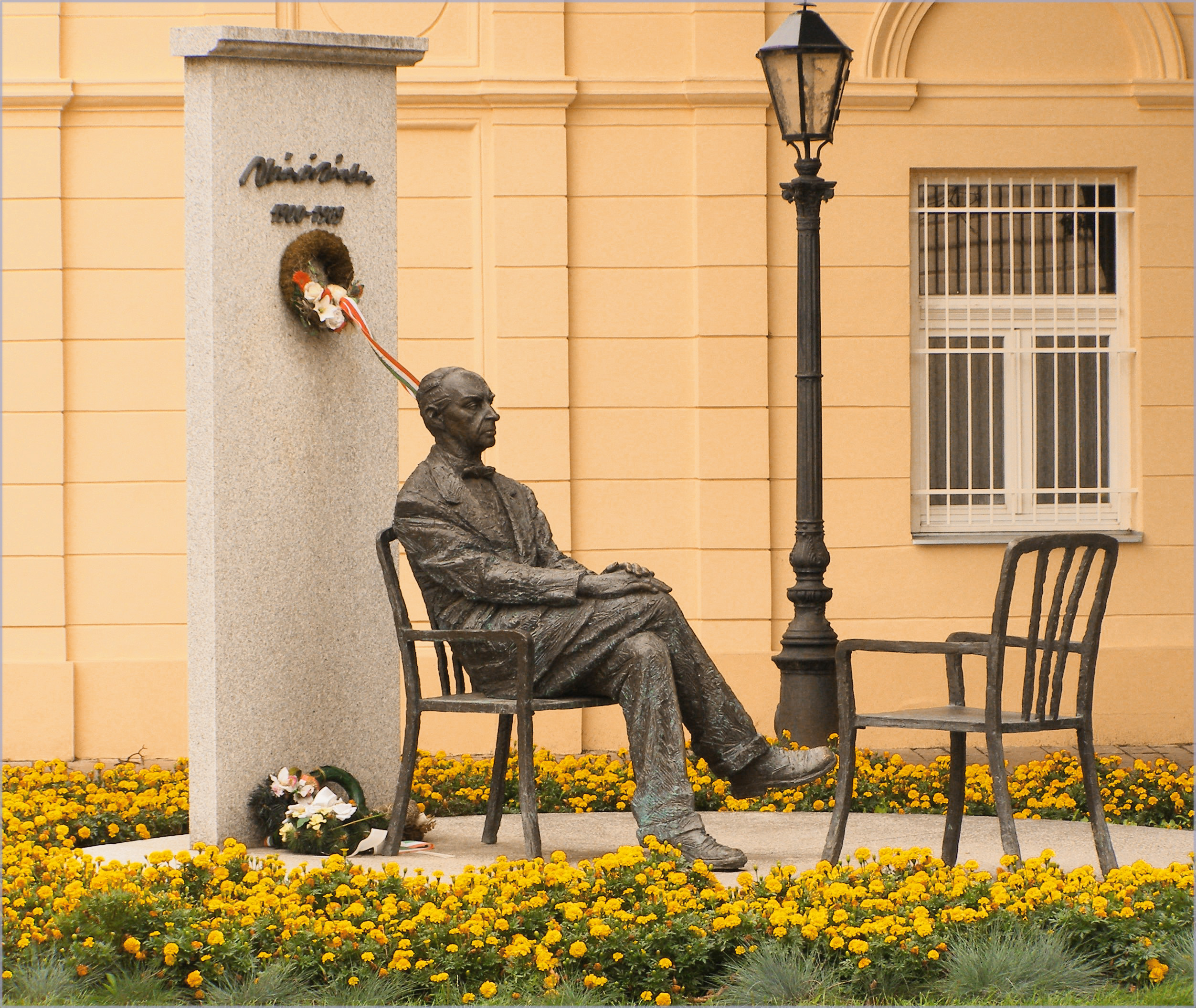 Sándor Márai - pamätník I